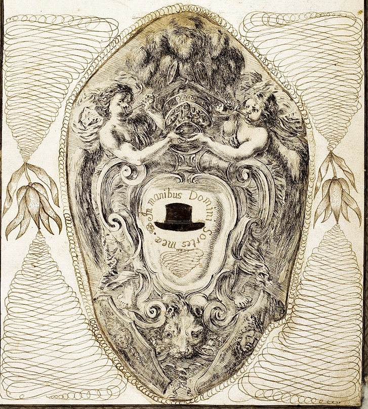 Wappen der Familie Capellini von Wickenburg genannt Stechinelli